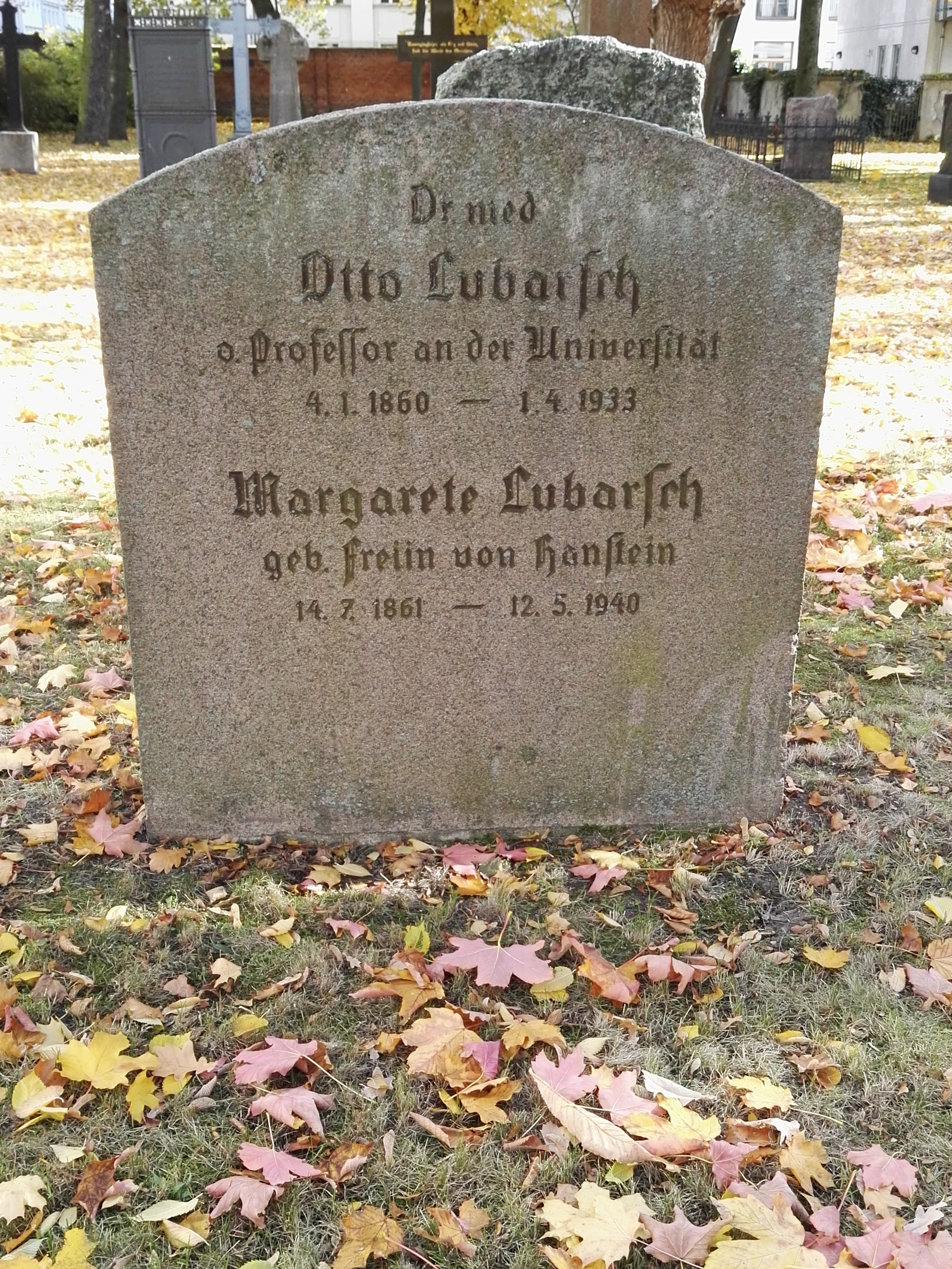 Grab von Prof. Otto Lubarsch auf dem Alten Garnisonfriedhof in Berlin-Mitte